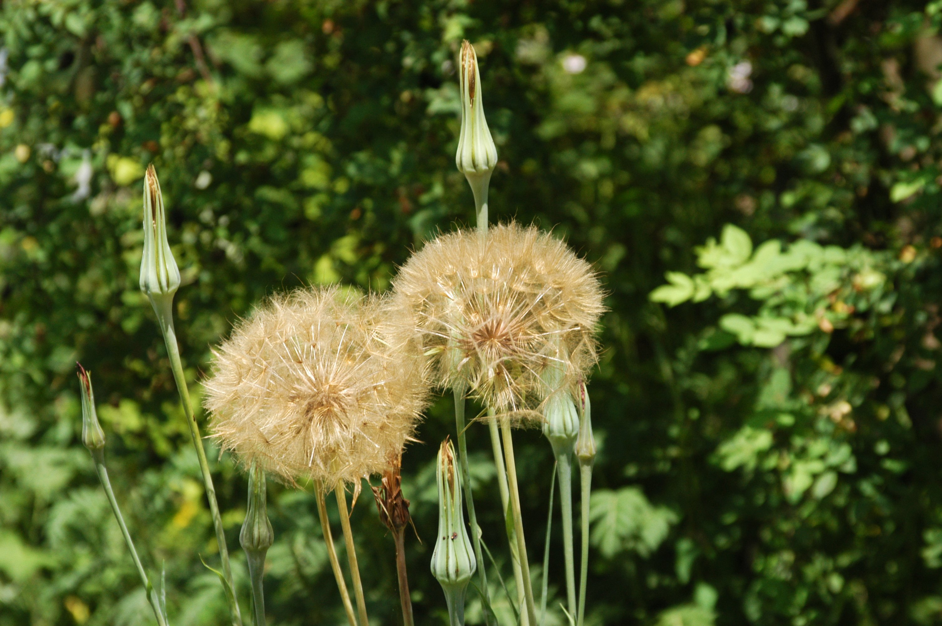 Samenkopf von Haferwurzel (Tragopogon porrifolius)